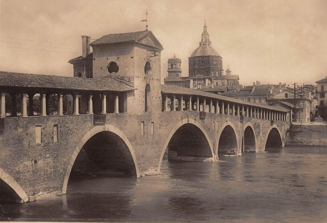 Ponte coperto di Pavia, in una foto antecedente alla distruzione dello stesso ponte avvenuta a causa di un bombardamento del settembre 1944